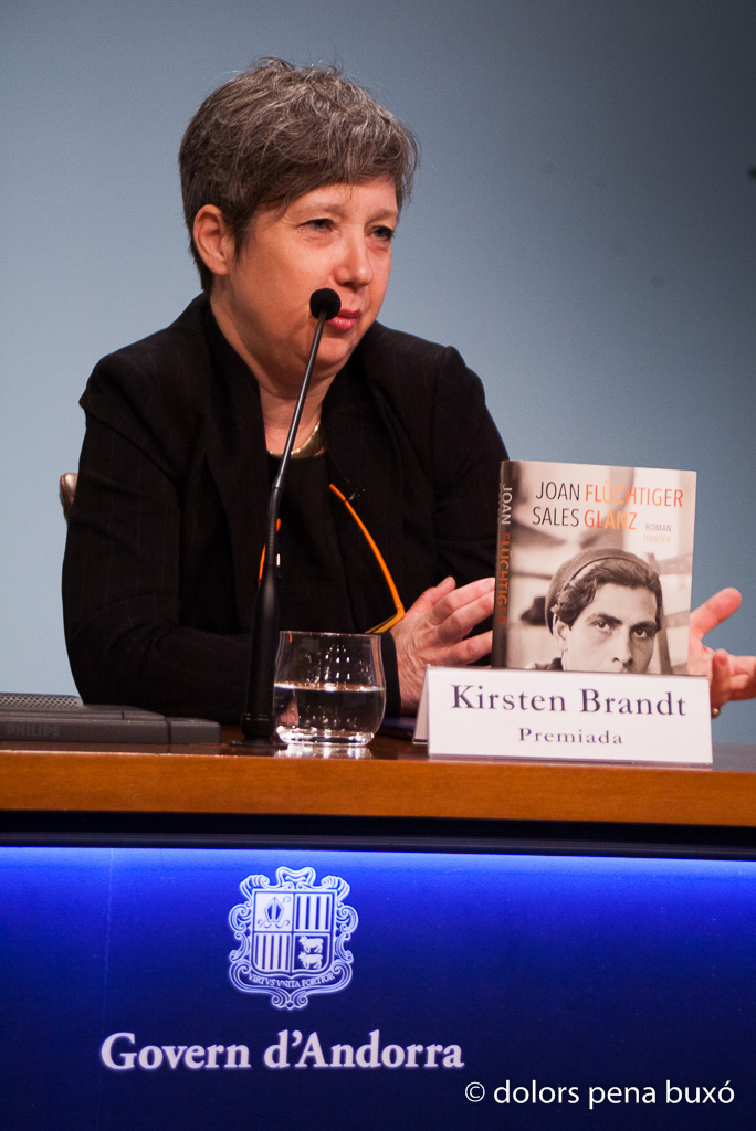 Kirsten Brandt als Premis Ramon Llull 2016